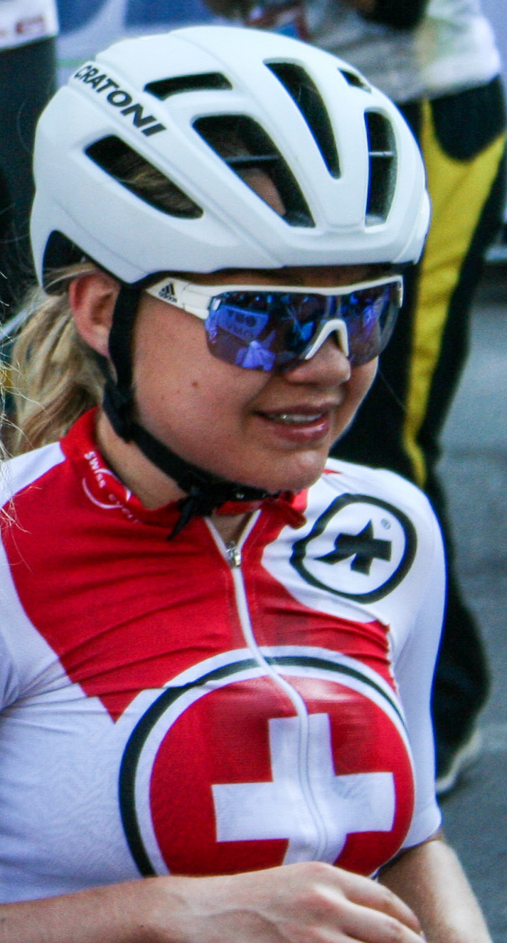 Sina Frei avant le départ de la course en ligne des championnats du monde de cyclisme sur route à Innsbruck en 2018.